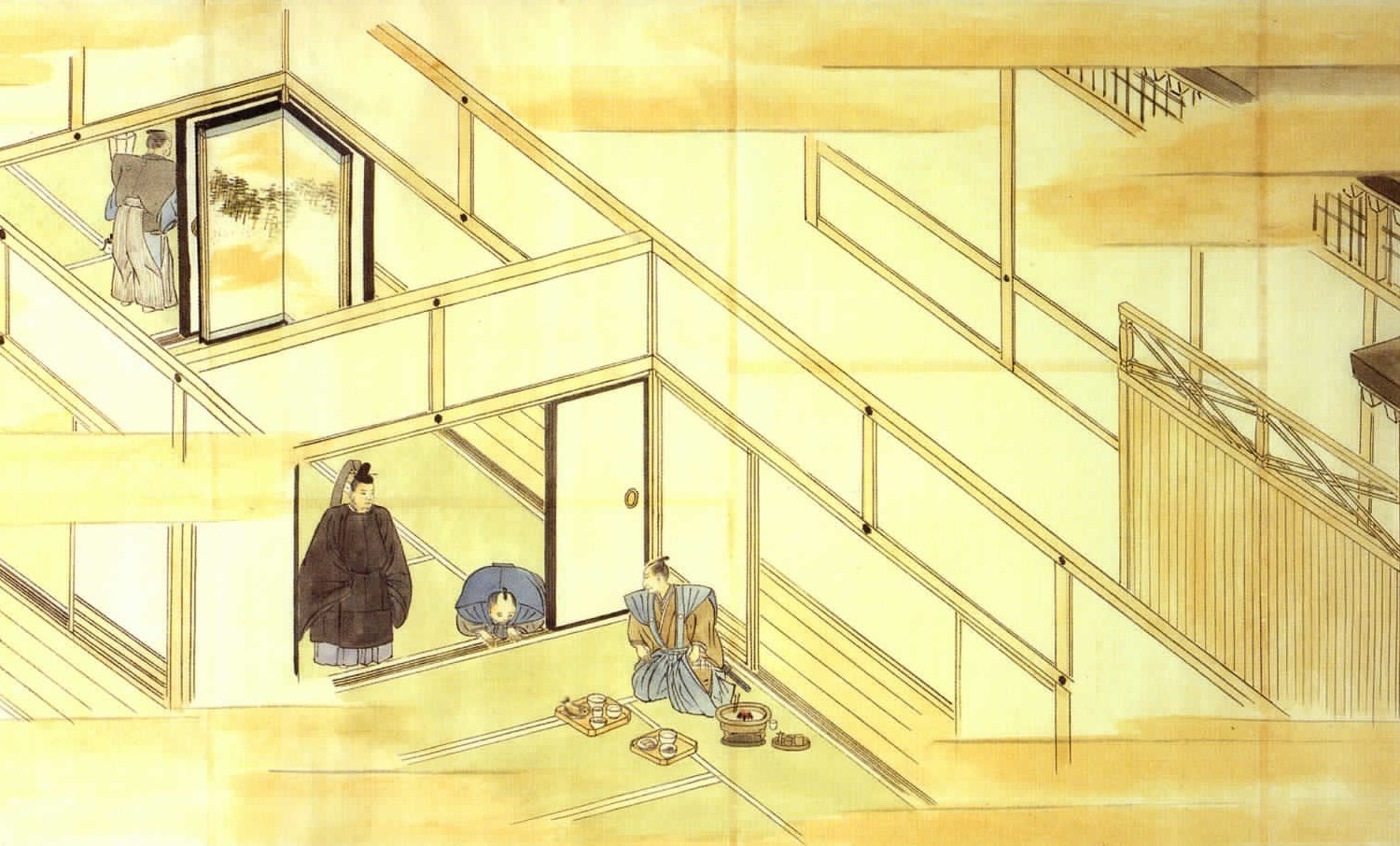 中央の人物が酒井忠義（『島津家文書 岩倉具視伝記絵巻』「安政年間酒井忠義へ賜膳之図」）。